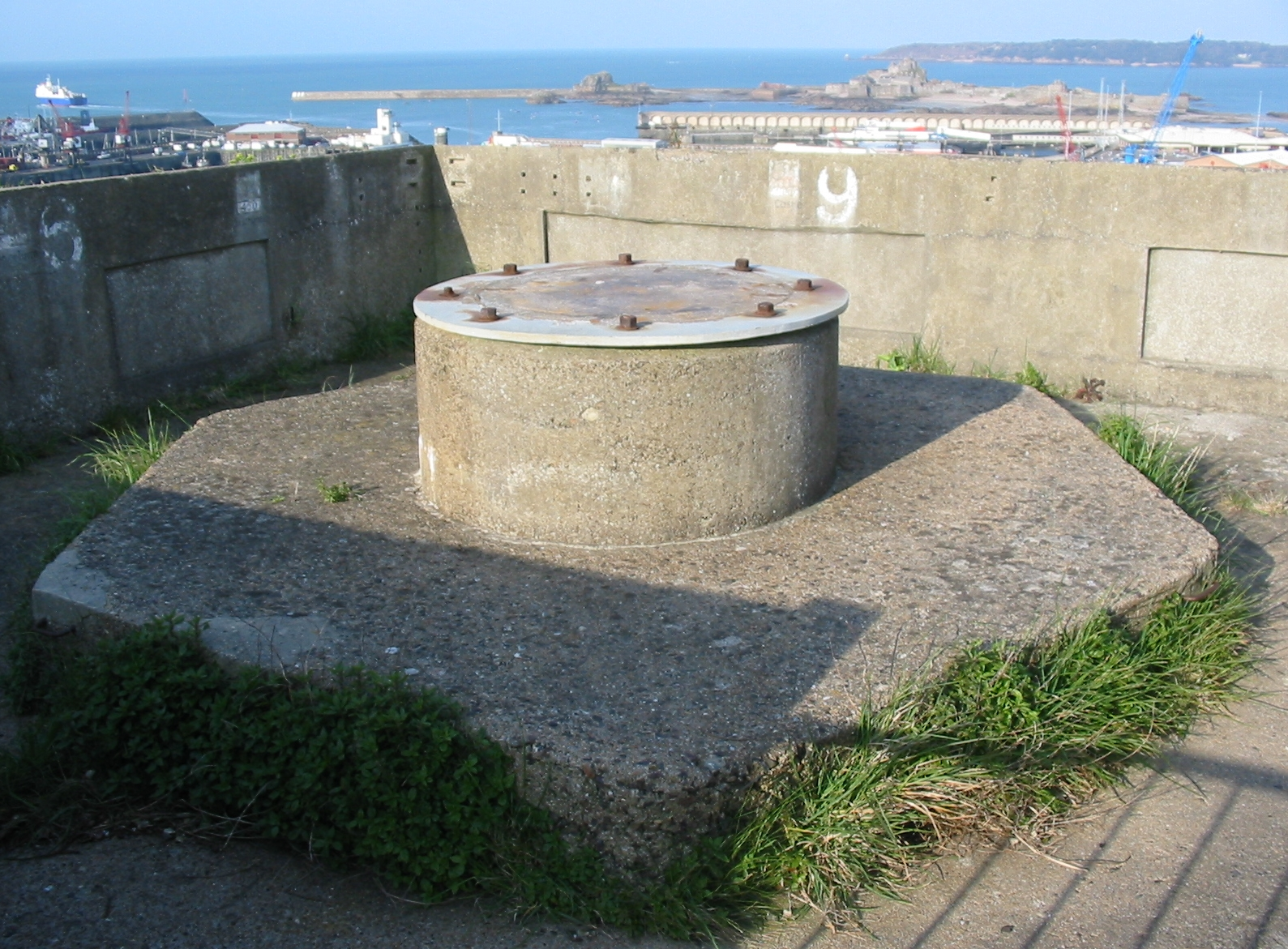 Nrf: Fort Régent, Saint Hélyi, Jèrri